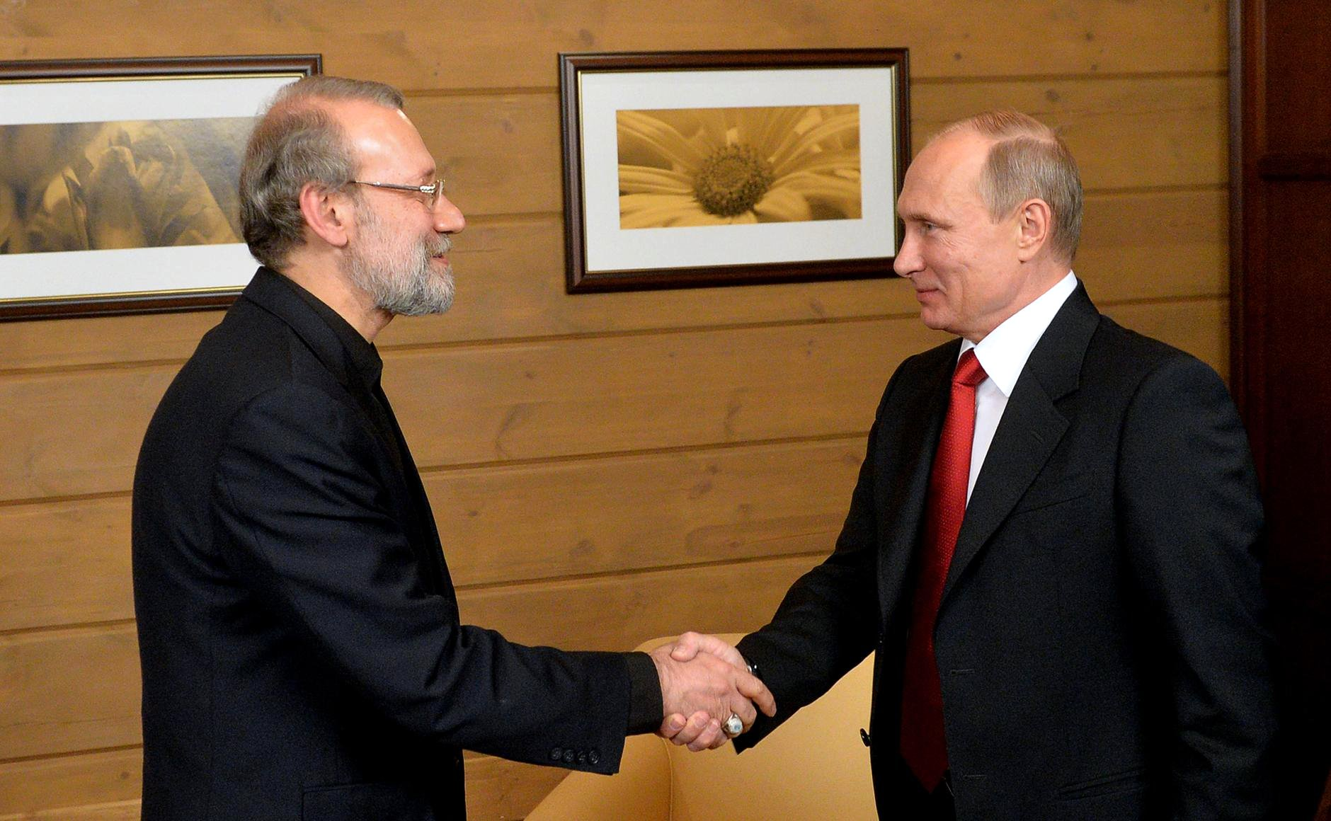 Встреча президента России Владимира Путина со спикером Исламского консультативного совета (парламента) Исламской Республики Иран Али Лариджани